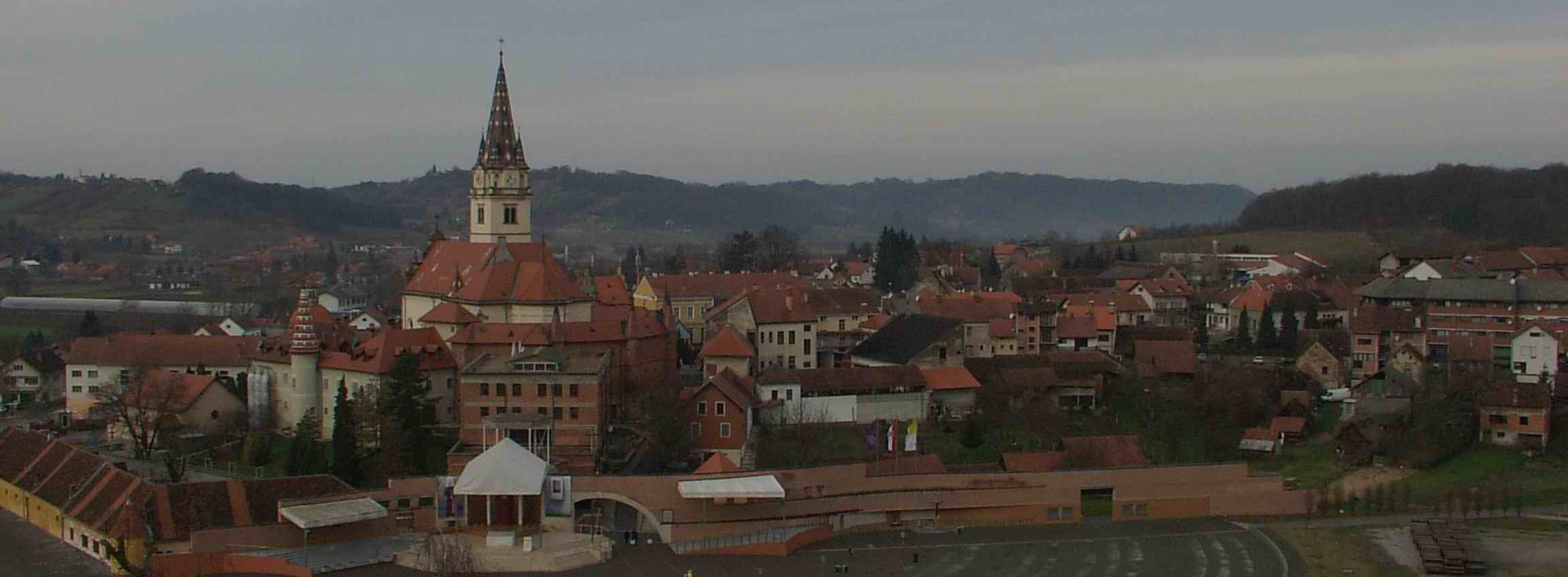 View on Marija Bistrica